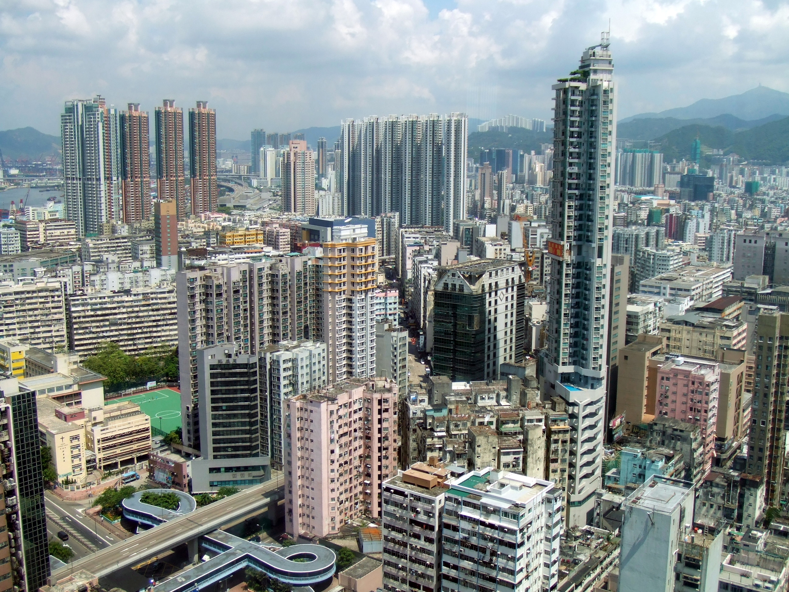 HK Tai Kok Tsui in 2007